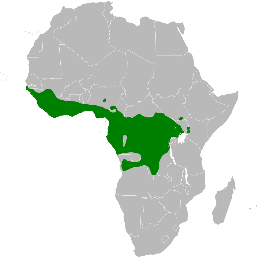 Bleda distribution map